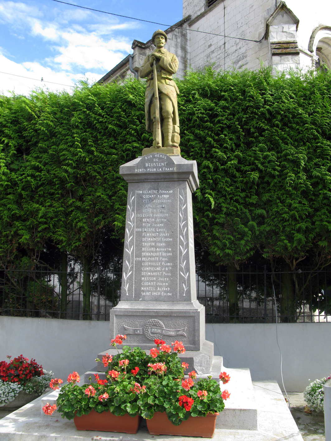 Beussent Monument aux Morts